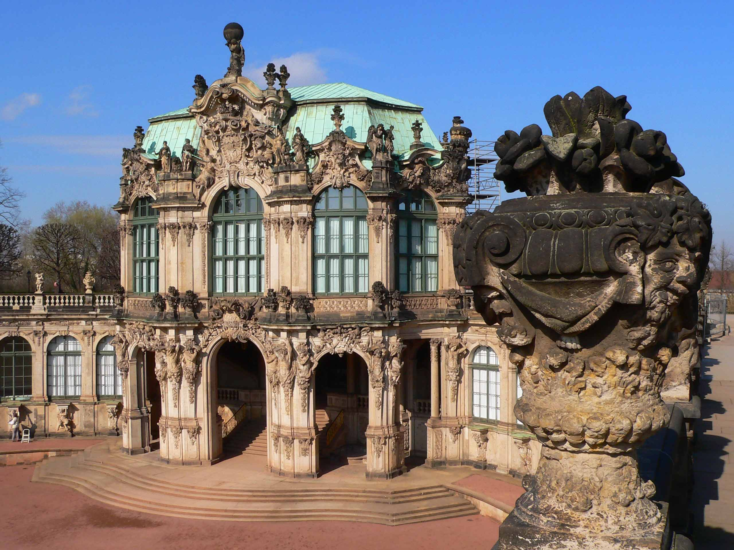 Dresden Zwinger03